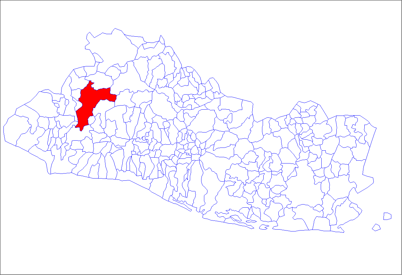 Ubicación del municipio salvadoreño de Santa Ana.